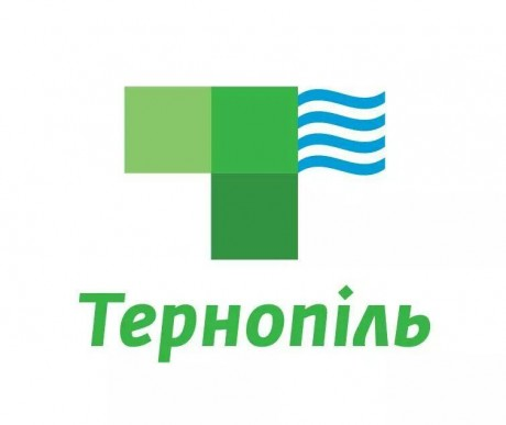 Офіційний промоційний логотип міста Тернополя.